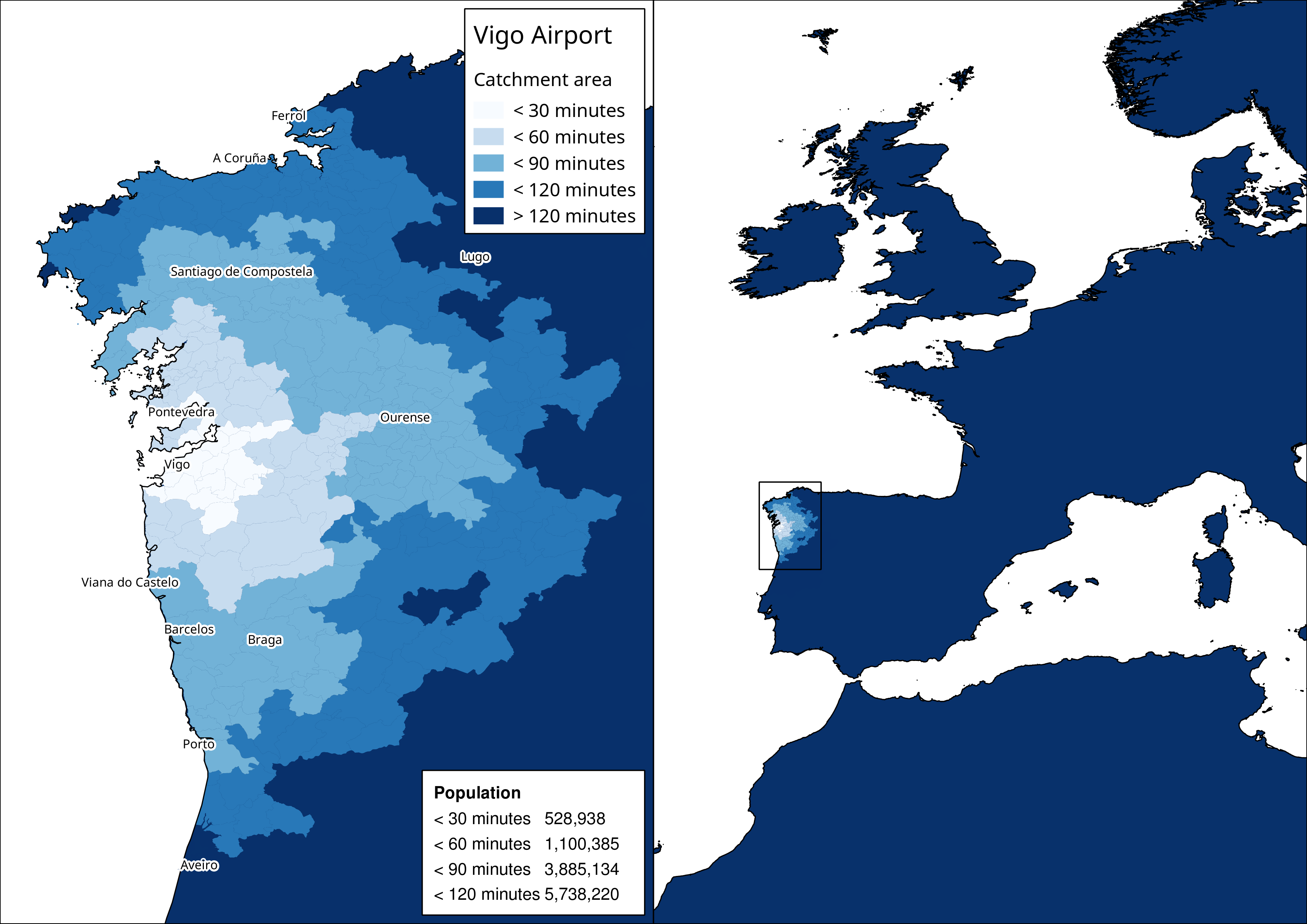 Vigo airport catchment area